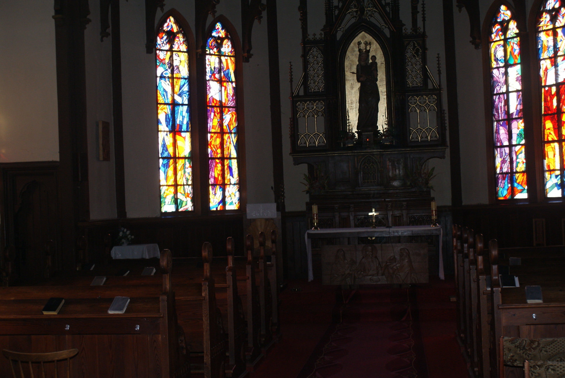 Kostol v Starom Smokovci postavený vo vysokohorskom alpskom štýle má charakteristické hrazdené murivo. . Kostol dal postaviť spišský biskup Juraj Császka na žiadosť arcikňažnej Klotildy v roku 1888. Projekt vyhotovil architekt Gedeon Majunke zo Spišskej Soboty.Na vitráži znázorňujúcej sv. Juraja je erb biskupa Juraj a Császku.